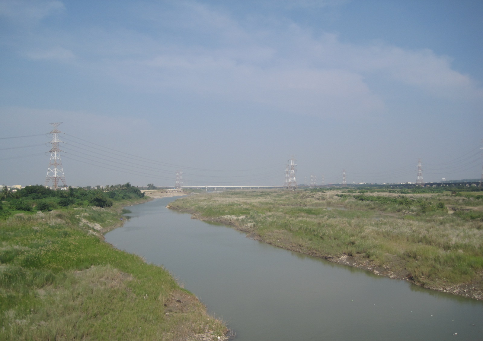 自曾文溪橋（臺一線上）拍攝的曾文溪。